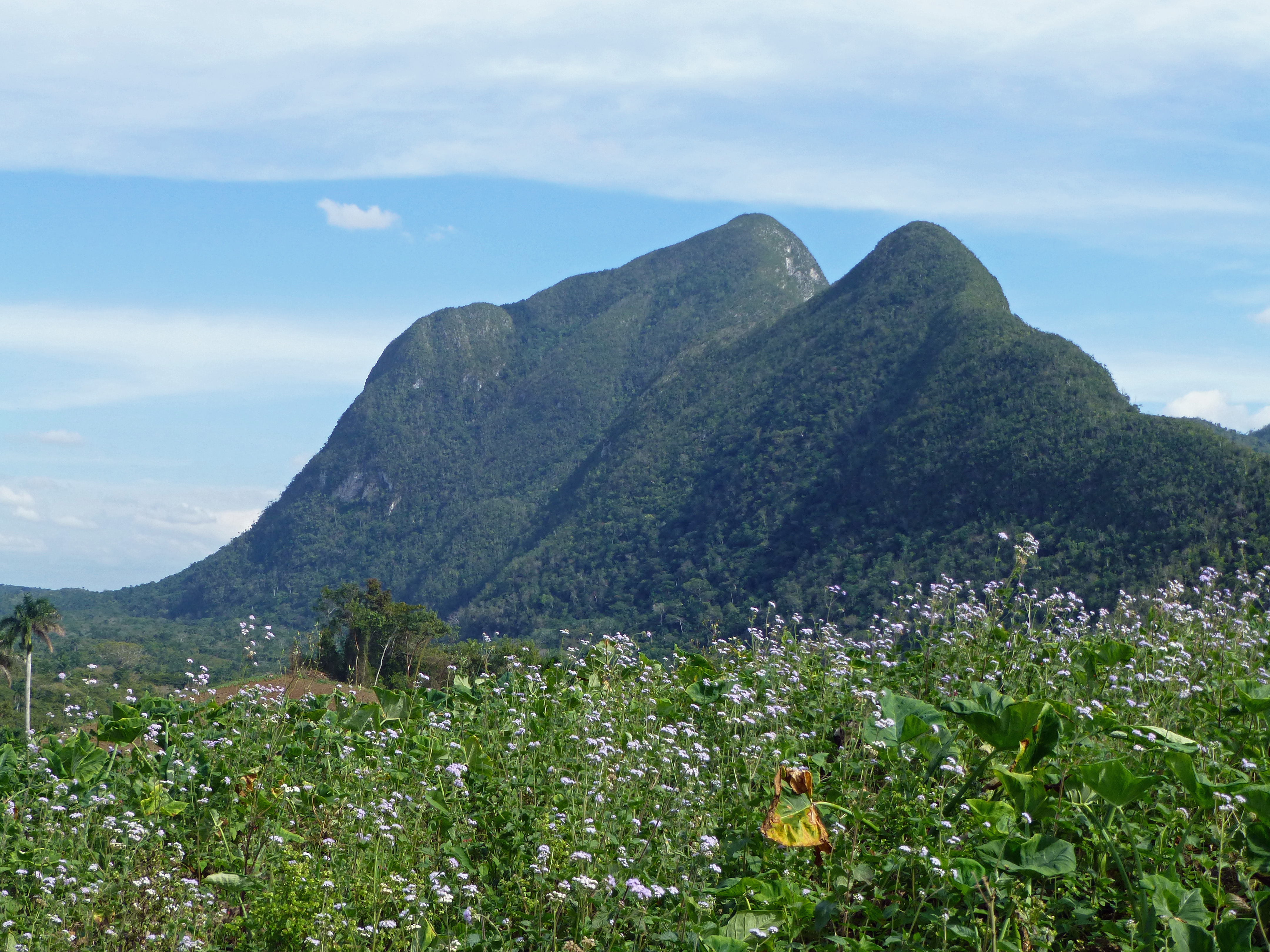 Pan de Guajaibón, province de Pinar del Río (Cuba)